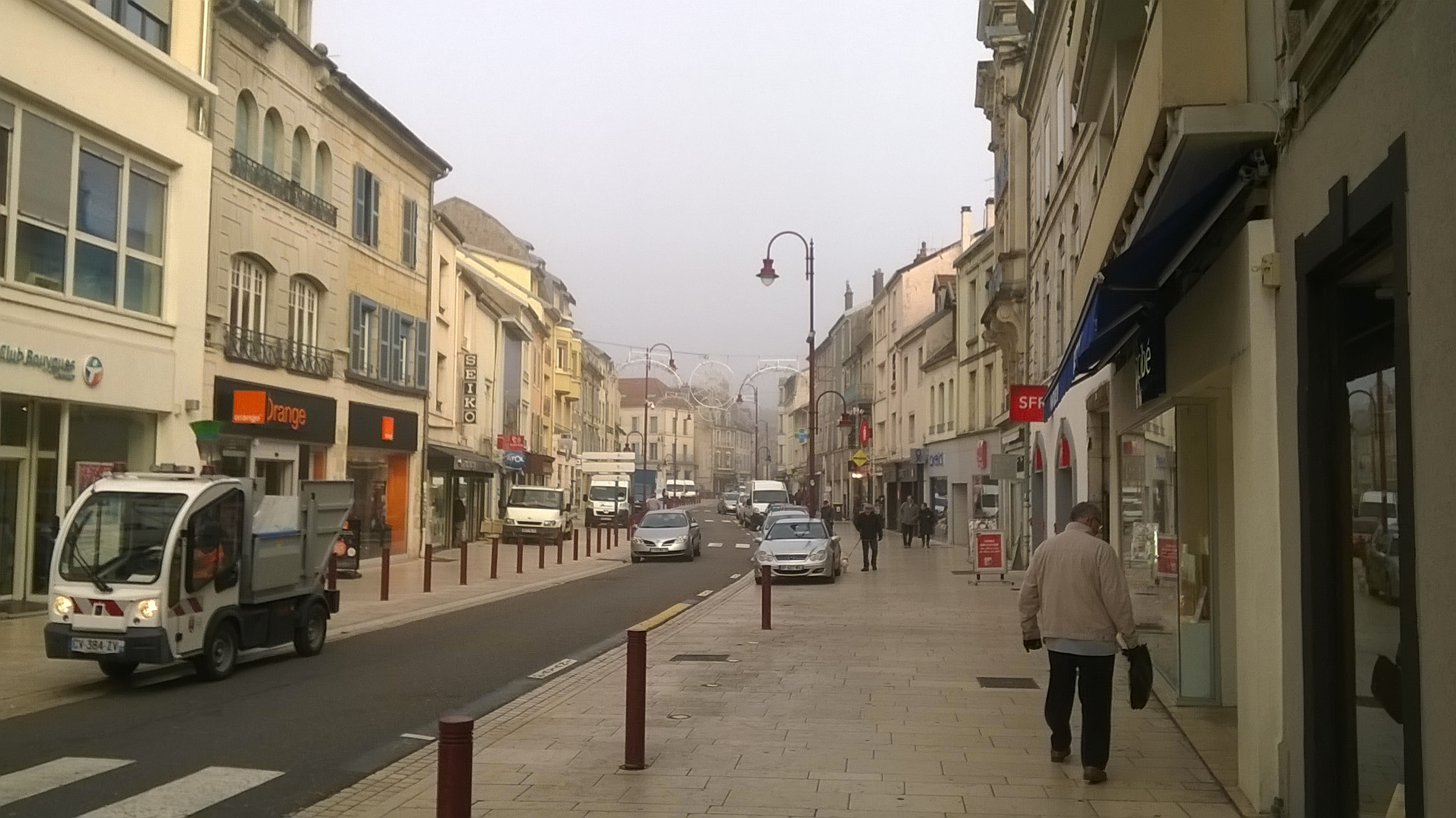 La rue Paul Morel (Vesoul)